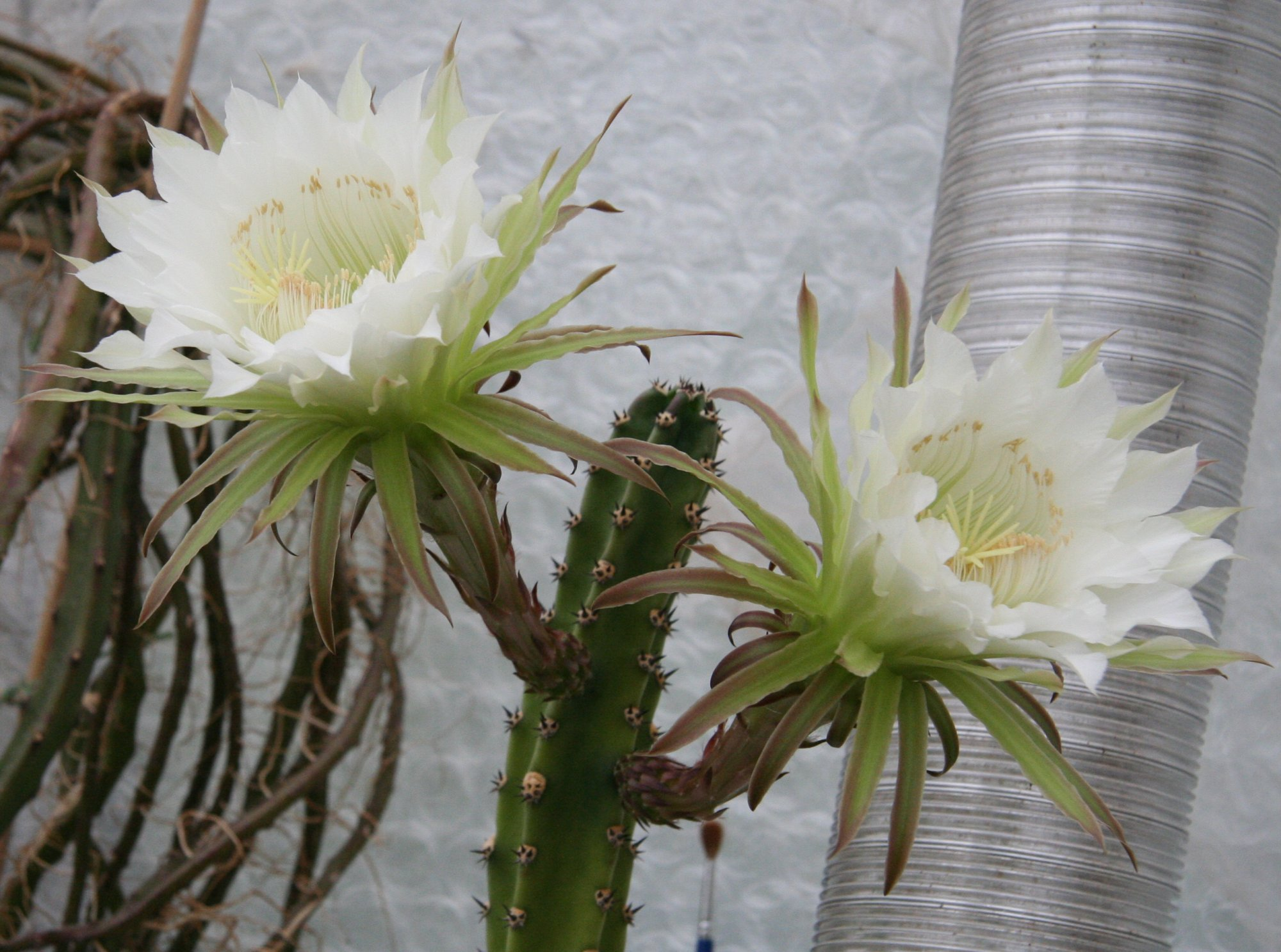 Harrisia jusbertii in Blüte